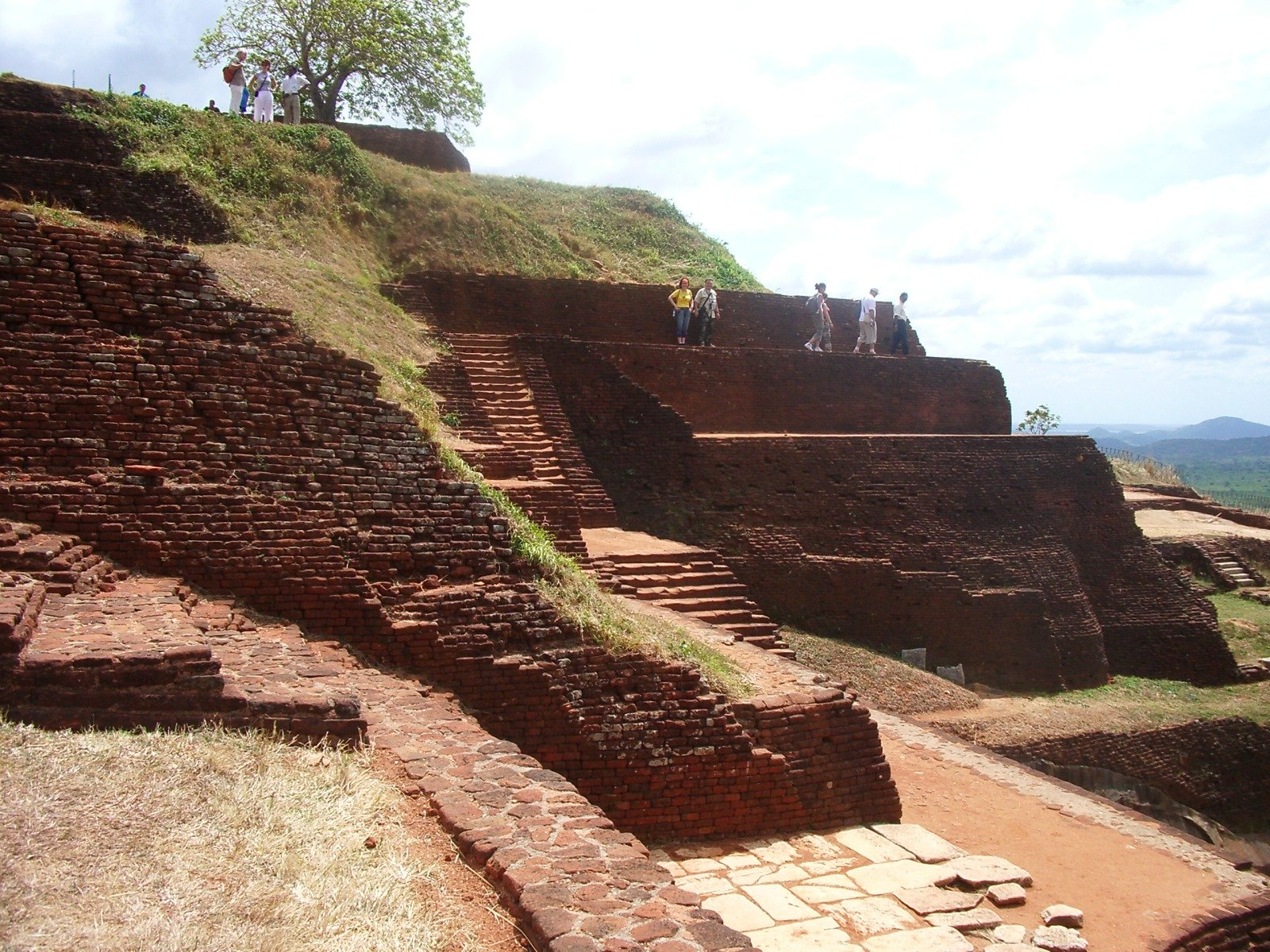 Palau superior de Sigiriya, foto feta per J. Ollé el juliol del 2006.